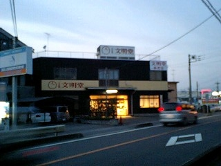 文明堂朝霞工場売店（埼玉県朝霞市上内間木）